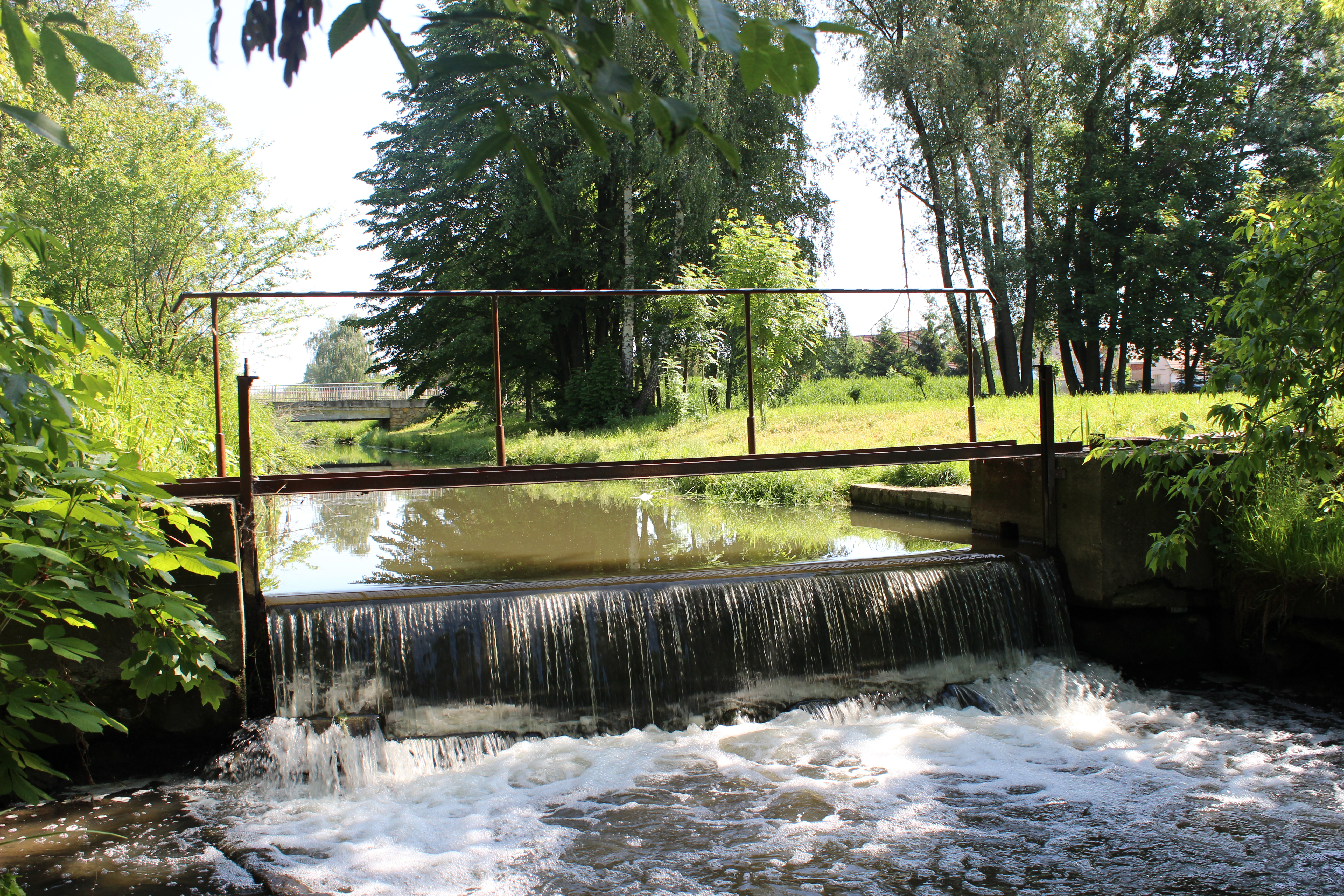 Vlkava, splav v obci Zbožíčko. Project: Fotíme Česko.